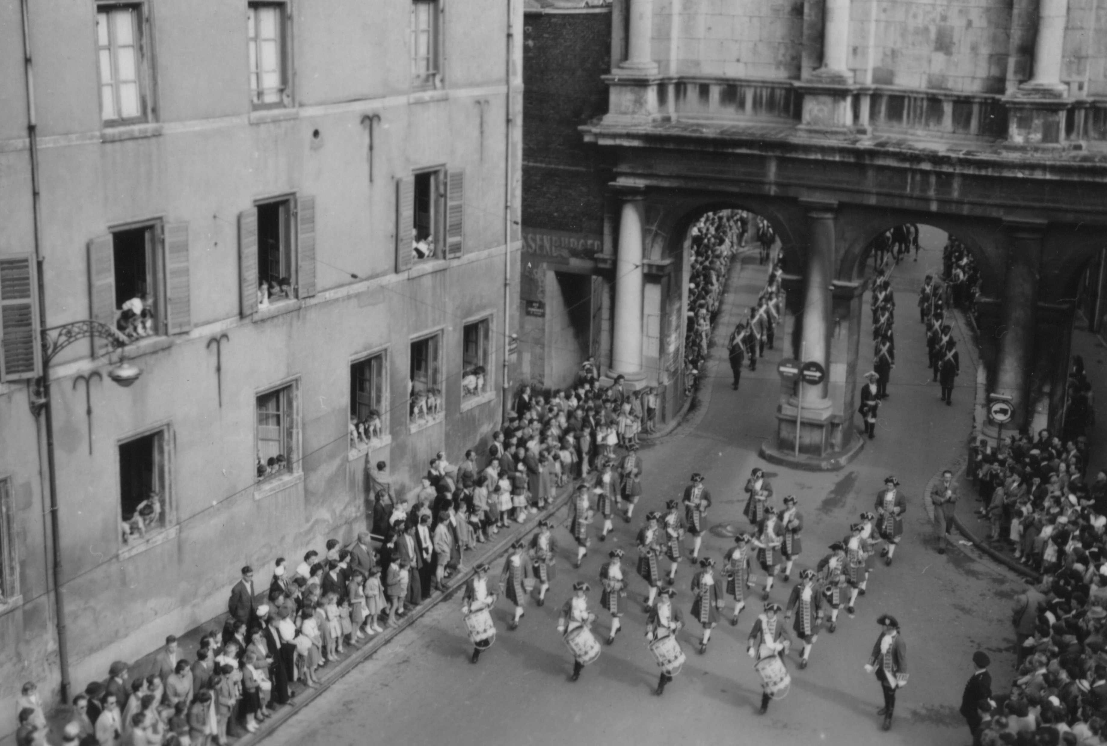 défilé rue Saint-Dizier lors du mariage Otto de Habsbourg-Lorraine.